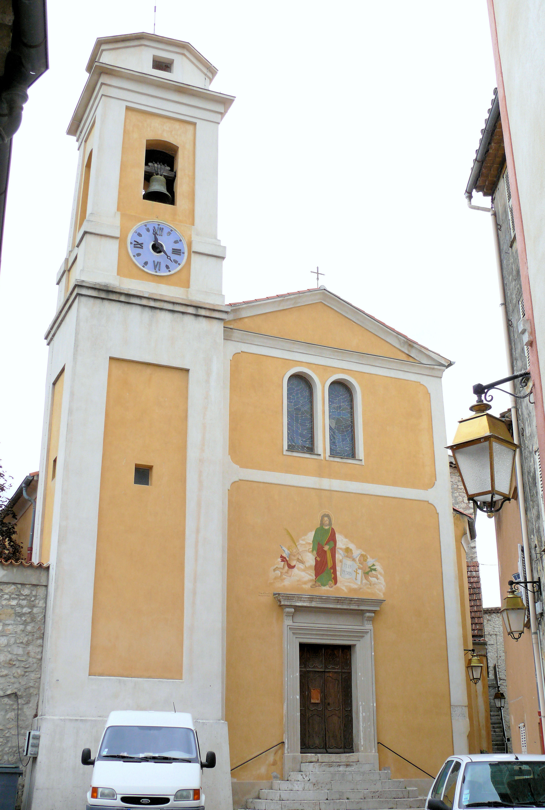 La Roquette-sur-Var - Façade de l'église Saint-Pierre